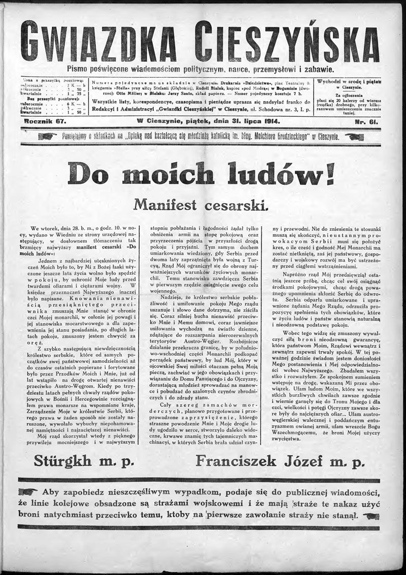 Front page of the Gwiazdka Cieszyńska magazine, 31 July 1914